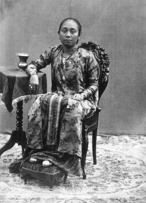 Foto. De Ratoe Kedaton, de hoofdvrouw van Hamengkoe Boewono V van Djogjakarta